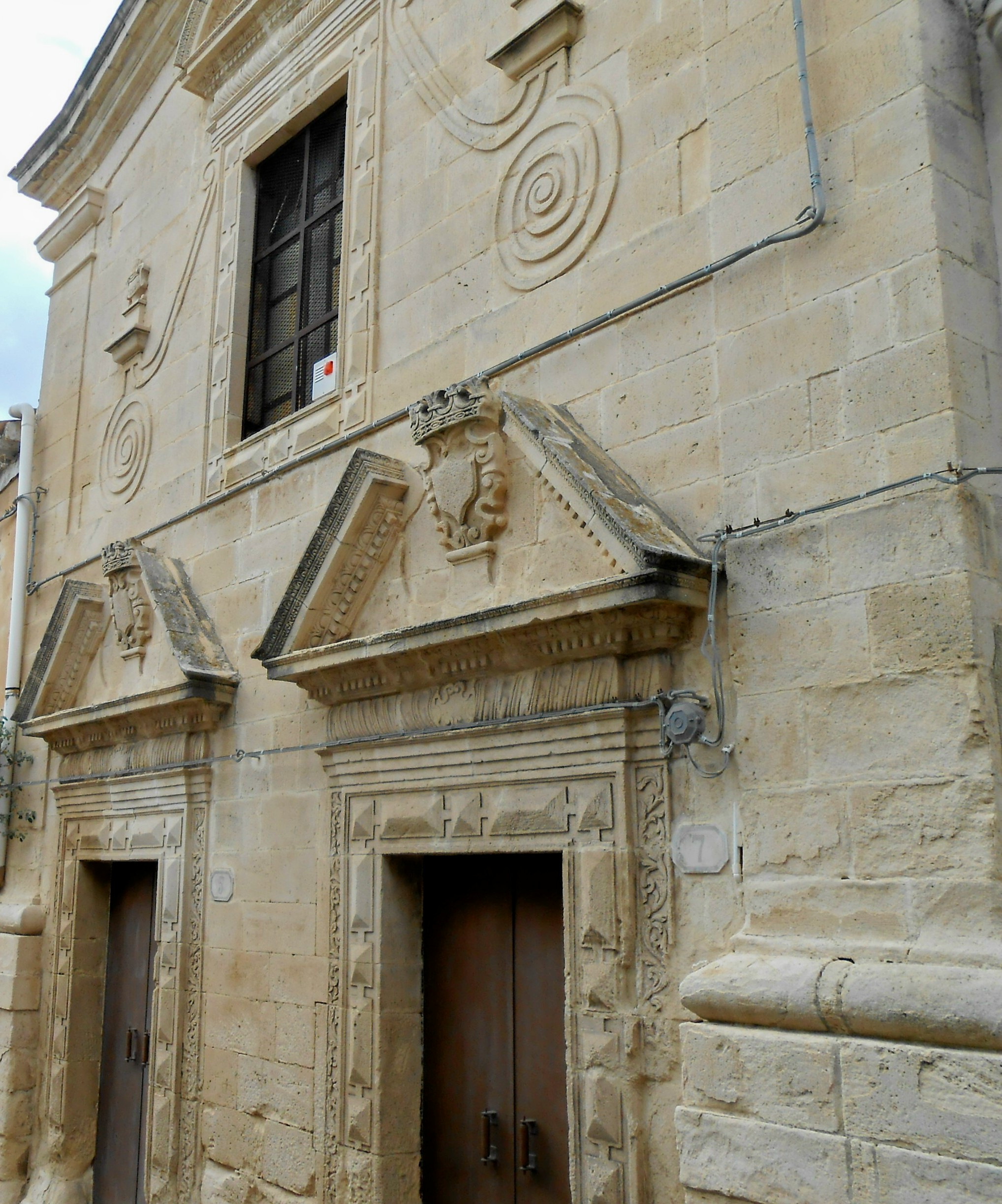 Chiesa dei SS. Angeli Custodi (o di S. Michele Arcangello). Sec. XIII-XVIII.